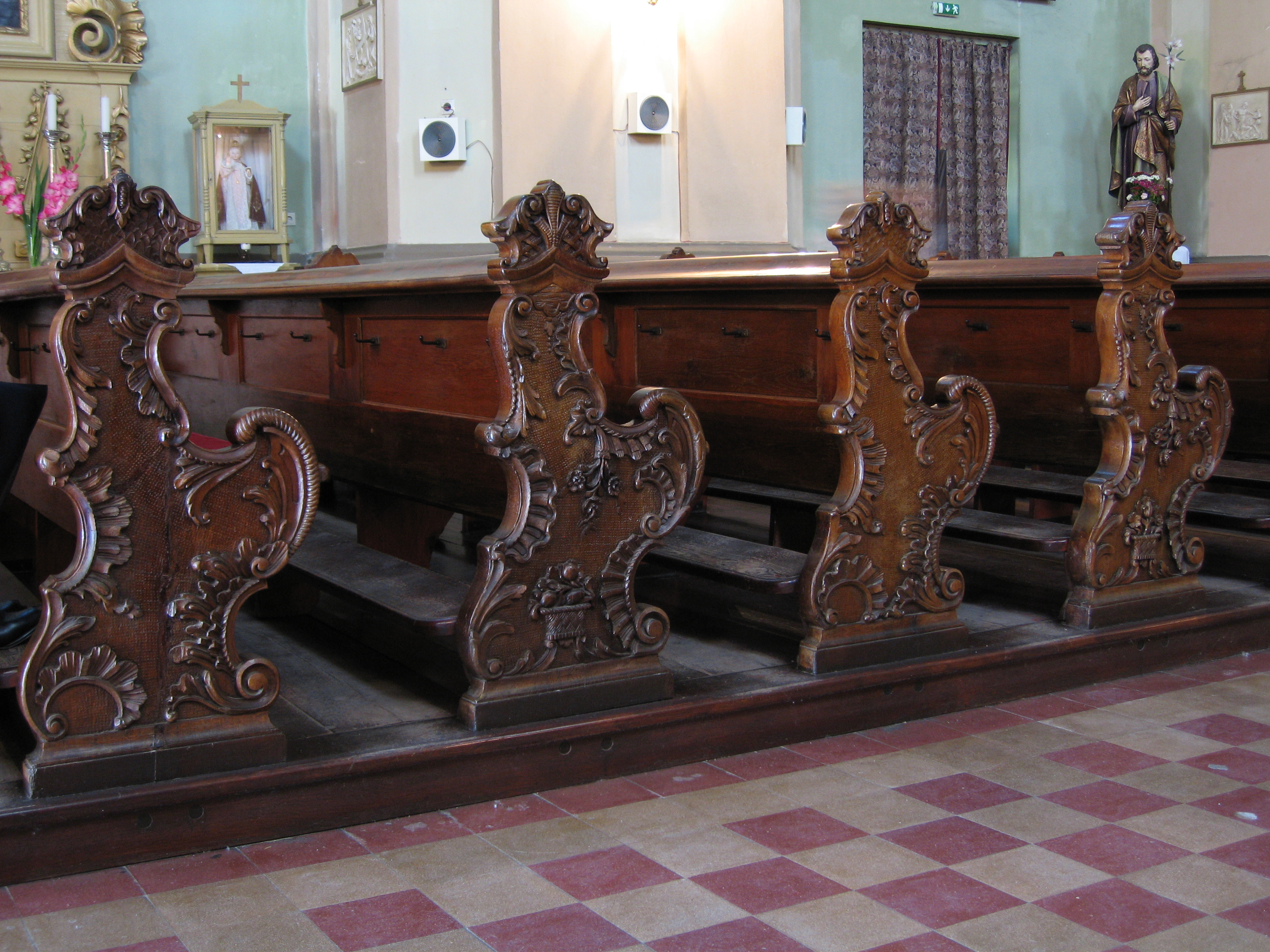 Szeged, felsővárosi templom barokk faragott padjai